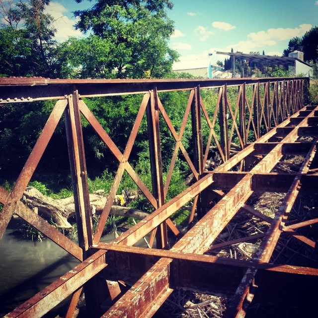 Puente Eiffel, sobre el río Genil a su paso por la localidad de Láchar, en la provincia de Granada (Región del Sureste, España).